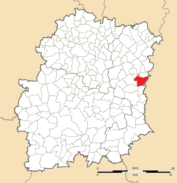 Carte de position du Coudray-Montceaux en Essonne (91)